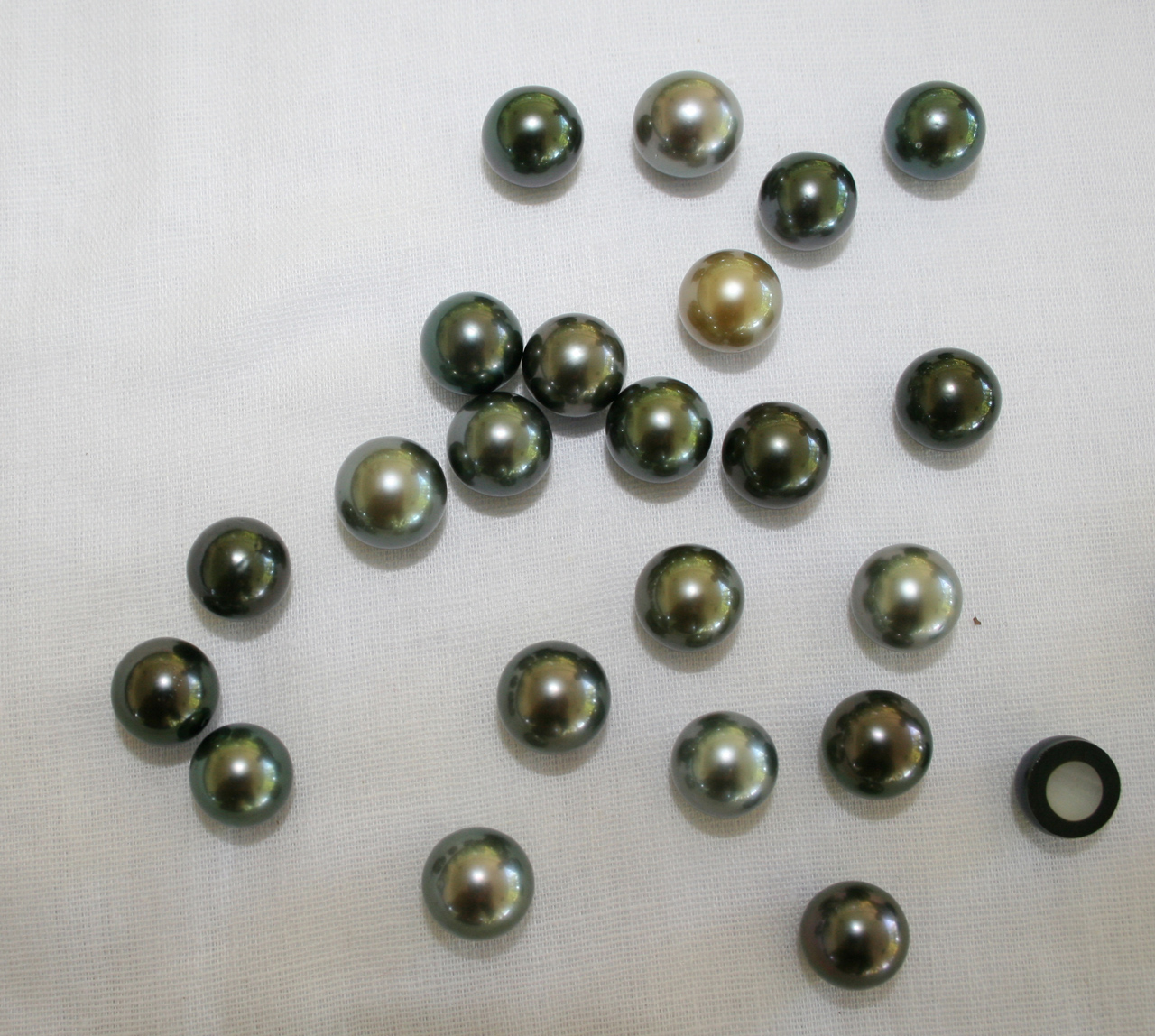 Perles de Tahiti. La perle la plus a droite a été coupée afin de montrer le nucléus et la couche de nacre.